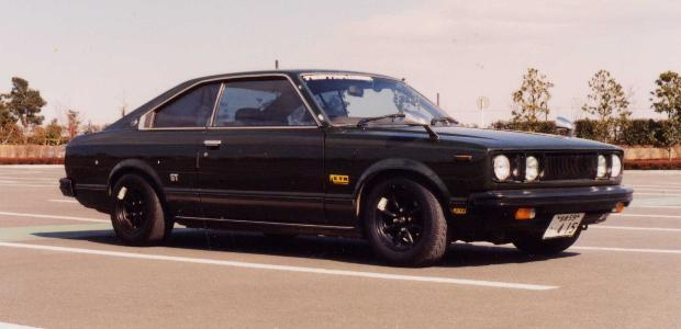 toyota carina 2000GT